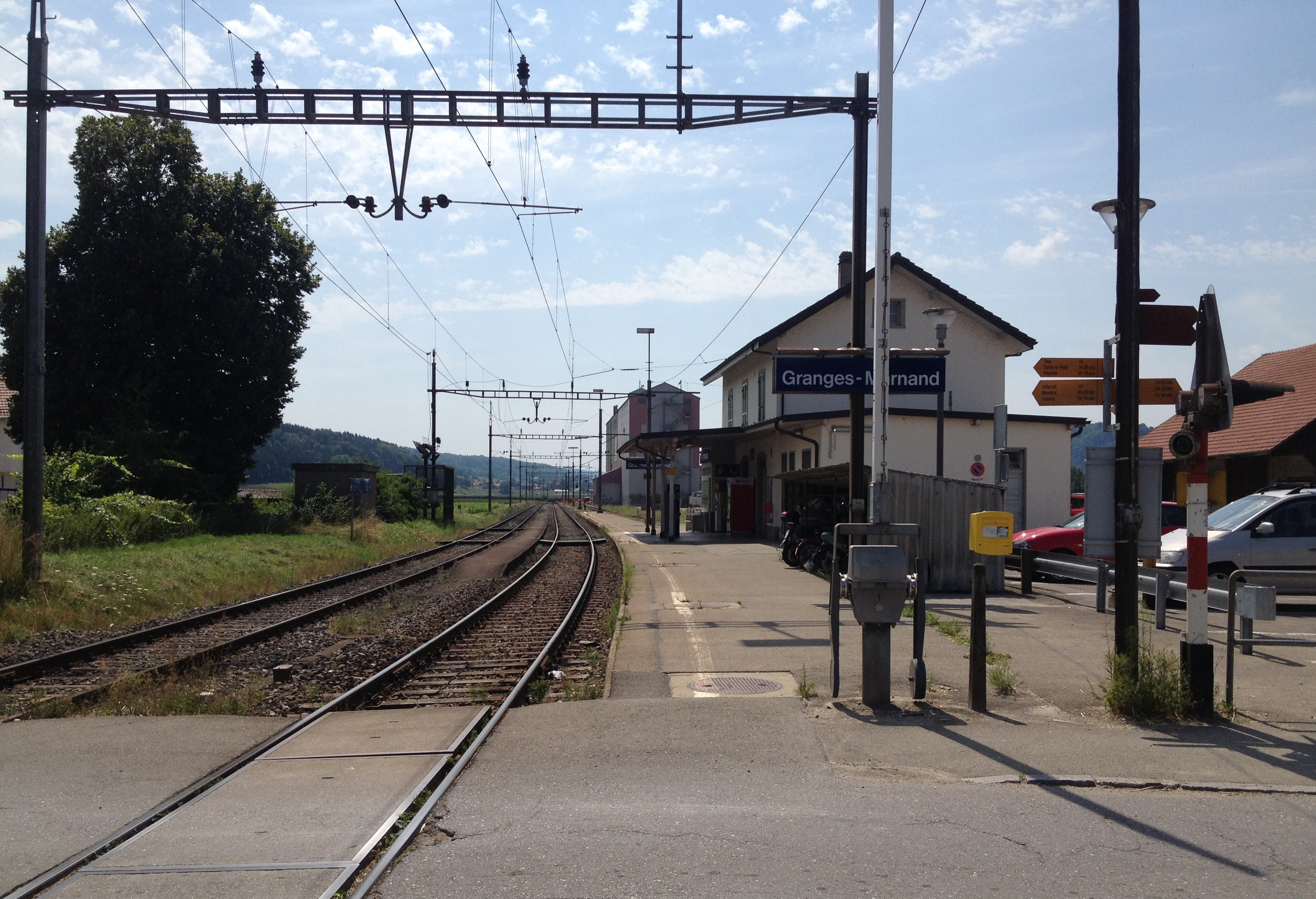 La gare de Granges-Marnand dans le canton de Vaud en Suisse.